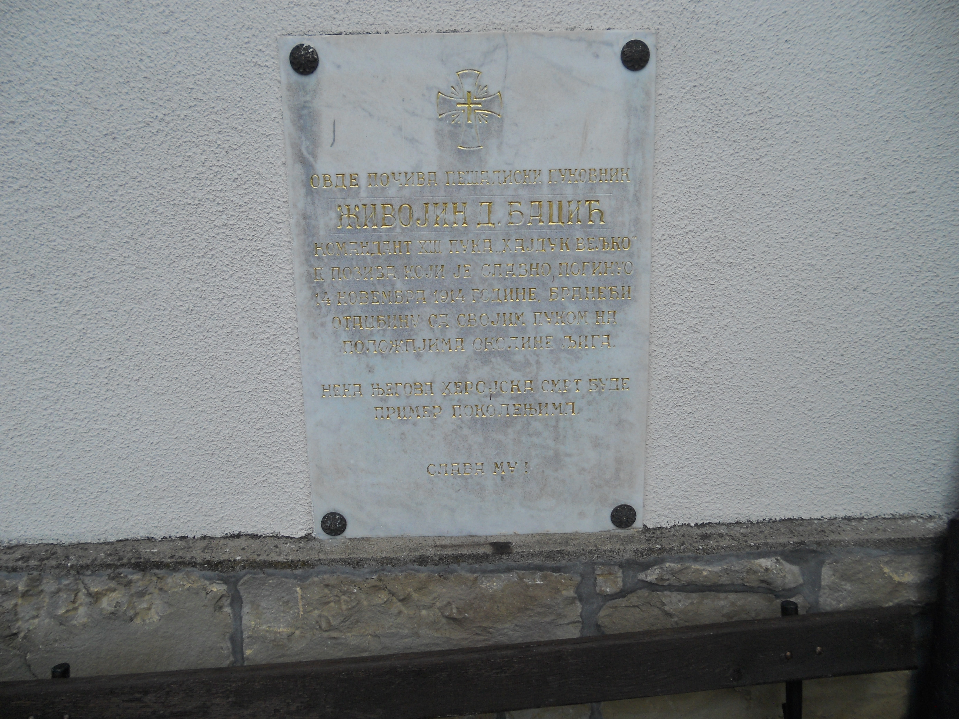 Crkva Sv. Jovana, Ljig